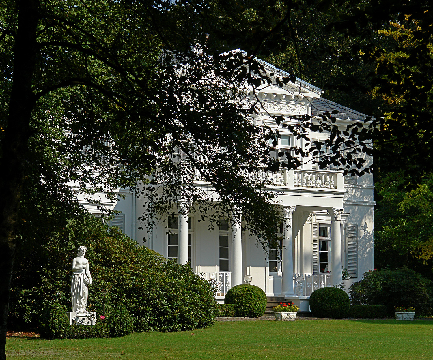 Landgut Arndt-Soltmann in Bremen, Rockwinkeler Heerstraße 111.Das abgebildete Objekt ist ein geschütztes Kulturdenkmal in der Freien Hansestadt Bremen, mit der Nr. 1040 beim Landesamt für Denkmalpflege registriert.